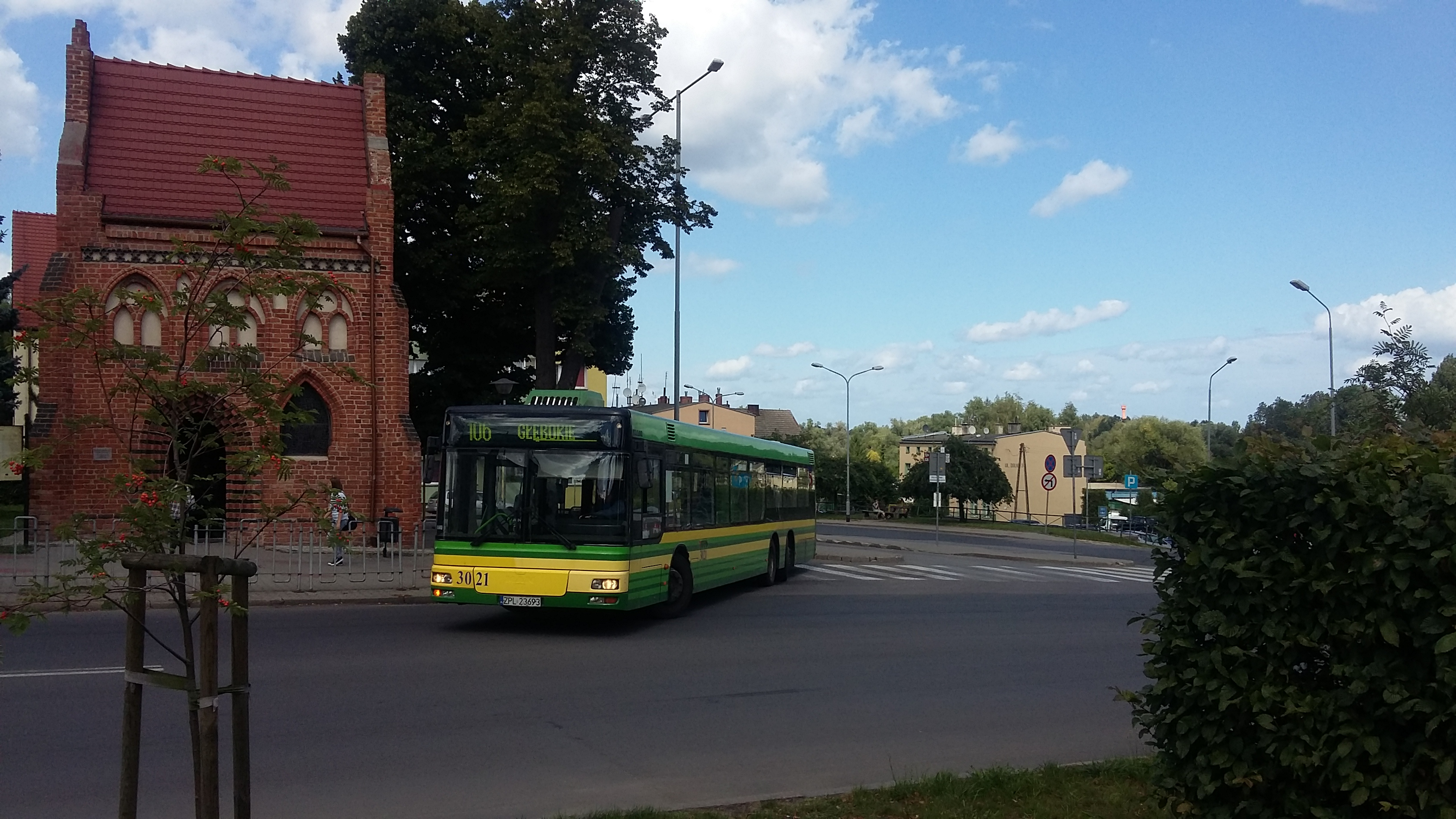 MAN NL 313-15 w Policach, 2016 r.